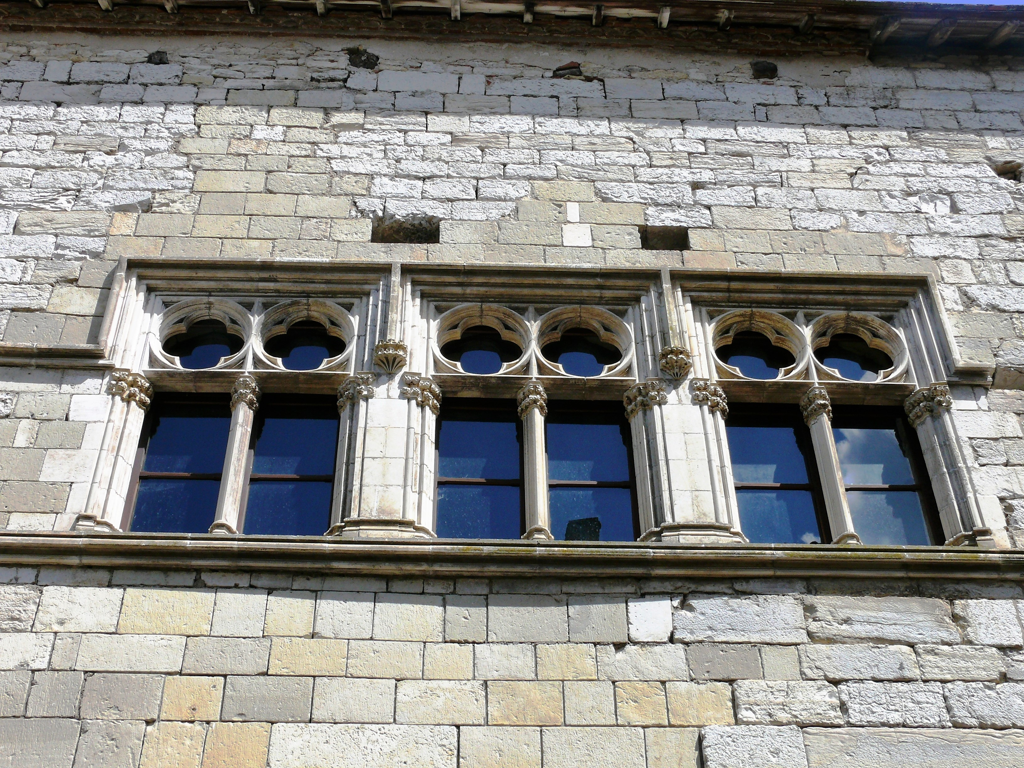 Martel - Hôtel de La Raymondie - Façade sur rue - Fenêtres